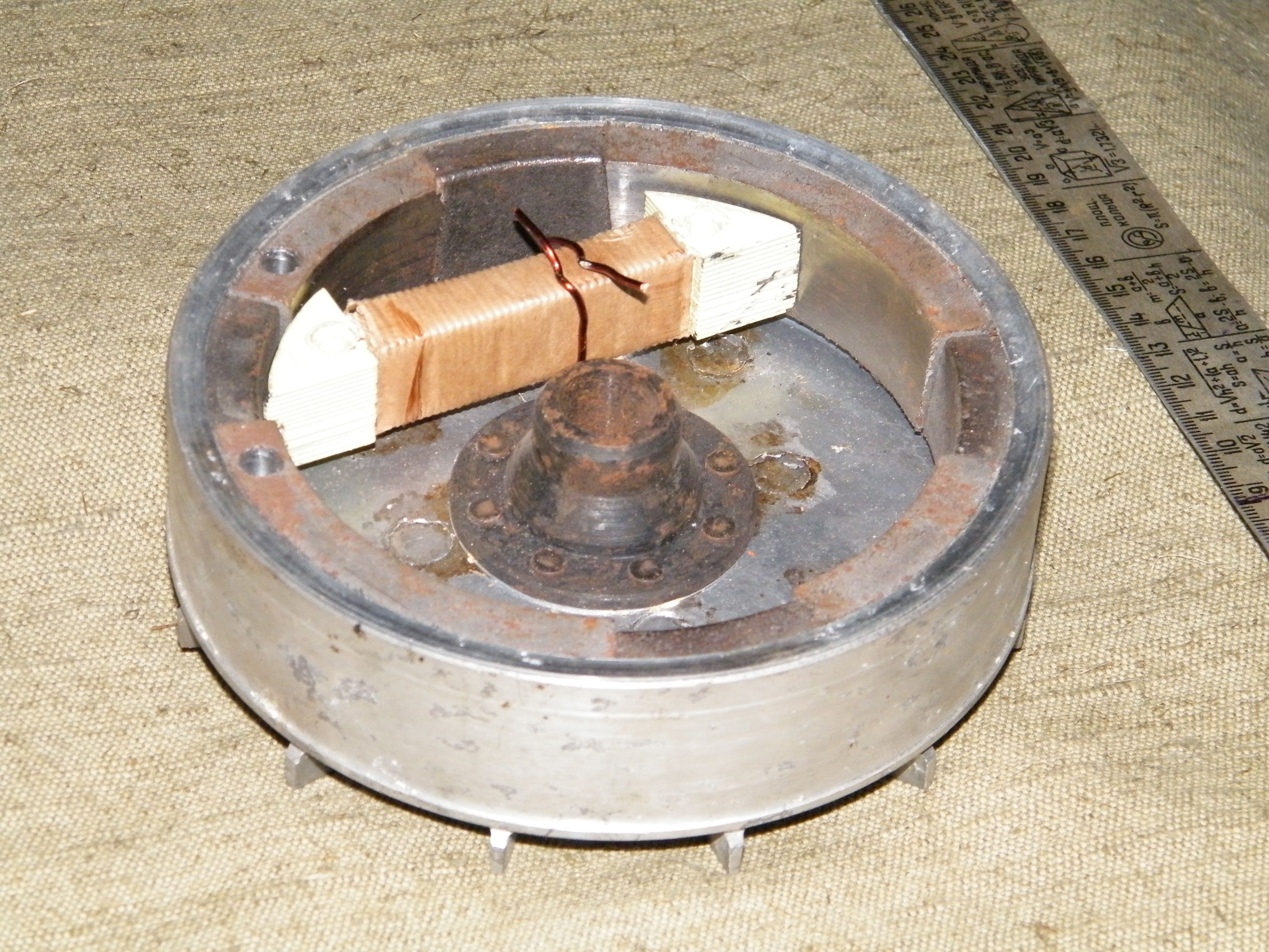 Простейший генератор переменного тока